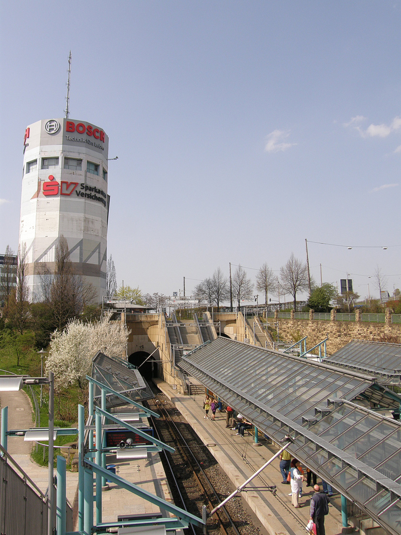 Bilder aus Stuttgart